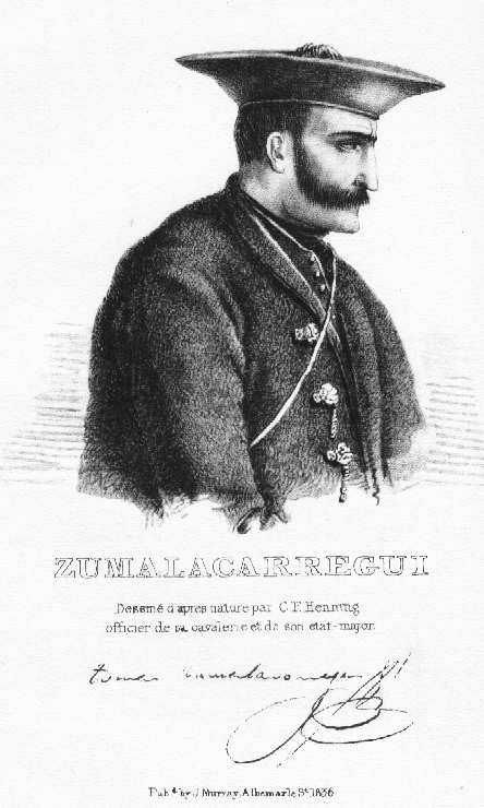 Tomás de Zumalacárregui